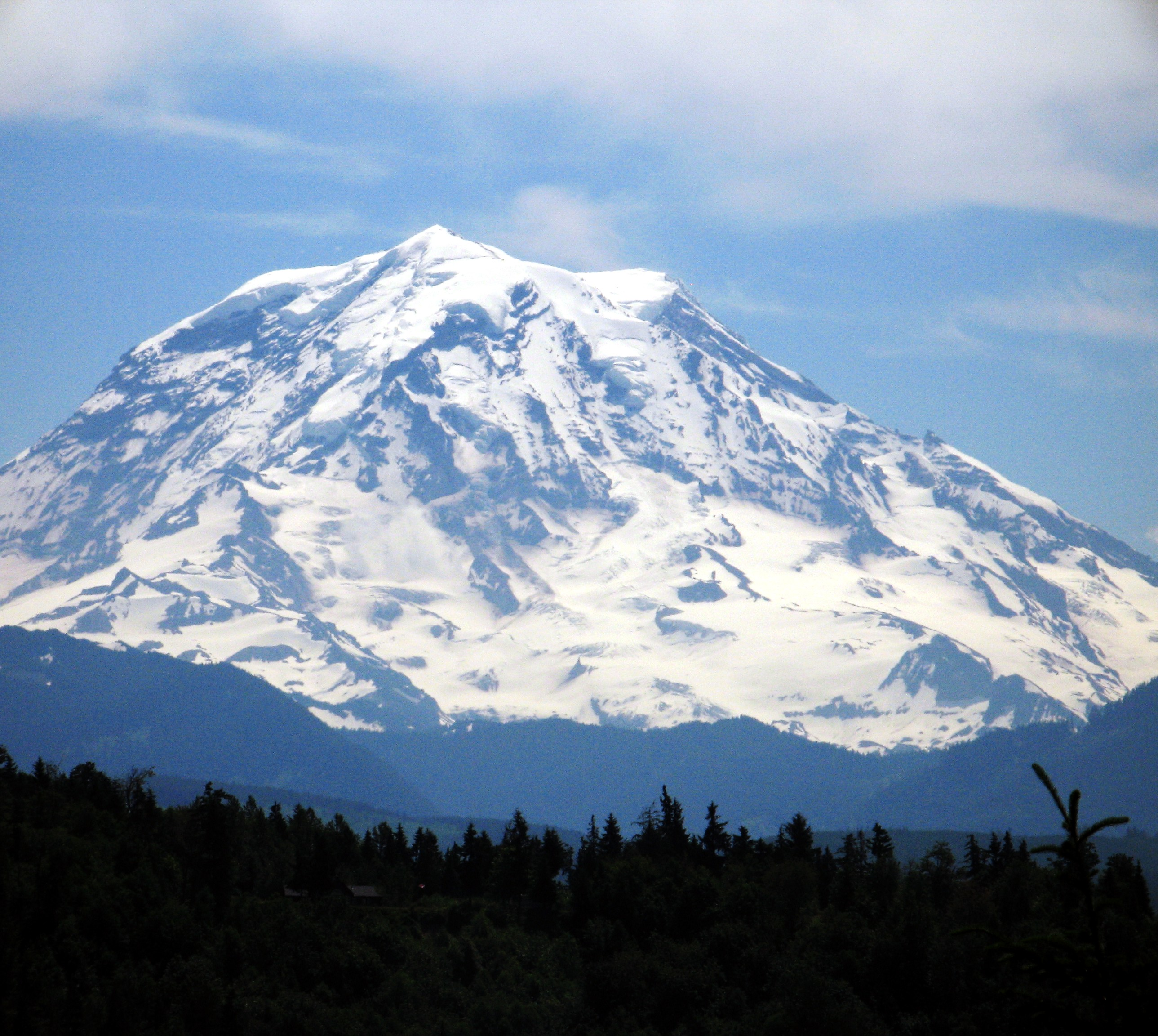 Mt. Rainier Clouds